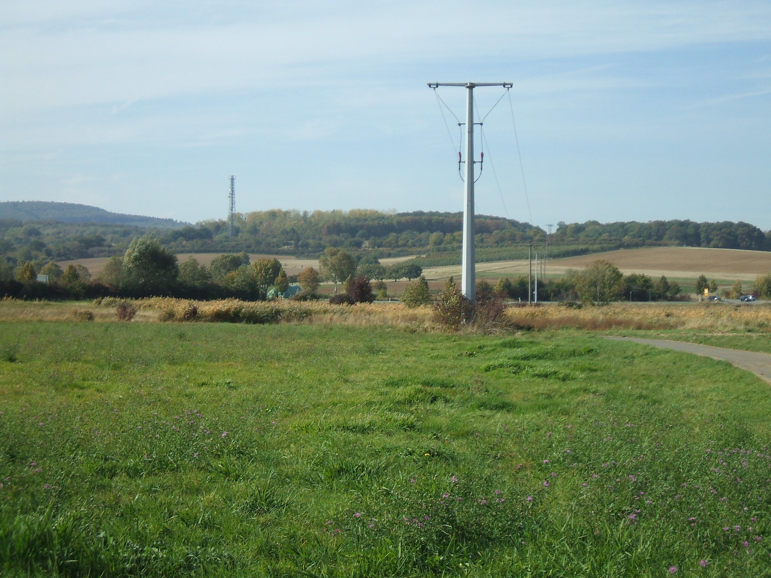 Blick von Osten, westlich der B 3, auf das Ockstädter Ried, das dem Riedgraben seinen Namen verlieh. Im Hintergrund links ist das FFH-Gebiet "Übungsplatz bei Ockstadt" zu sehen, rechts davon sind die Quellen von Stuhlgraben und Deutergraben zu erahnen, wohin die Freileitung führt. In der Mitte verläuft quer durch das Bild der Anschluss der B 275 an die B 3, links, und an die L 3134, rechts. Für die Zukunft ist geplant, dass die B 275 den Höhenrücken überwindet und, als Ortsumfahrung von Ober-Mörlen dienend, westlich vom Ort auf die heutige B 275 mündet.